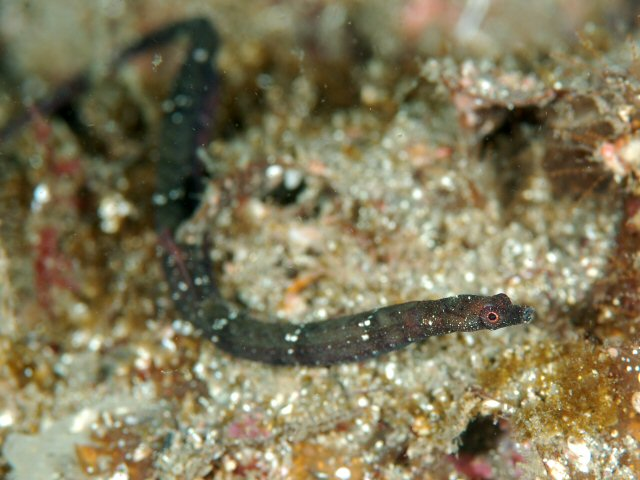 ホソウミヤッコ Halicampus boothae